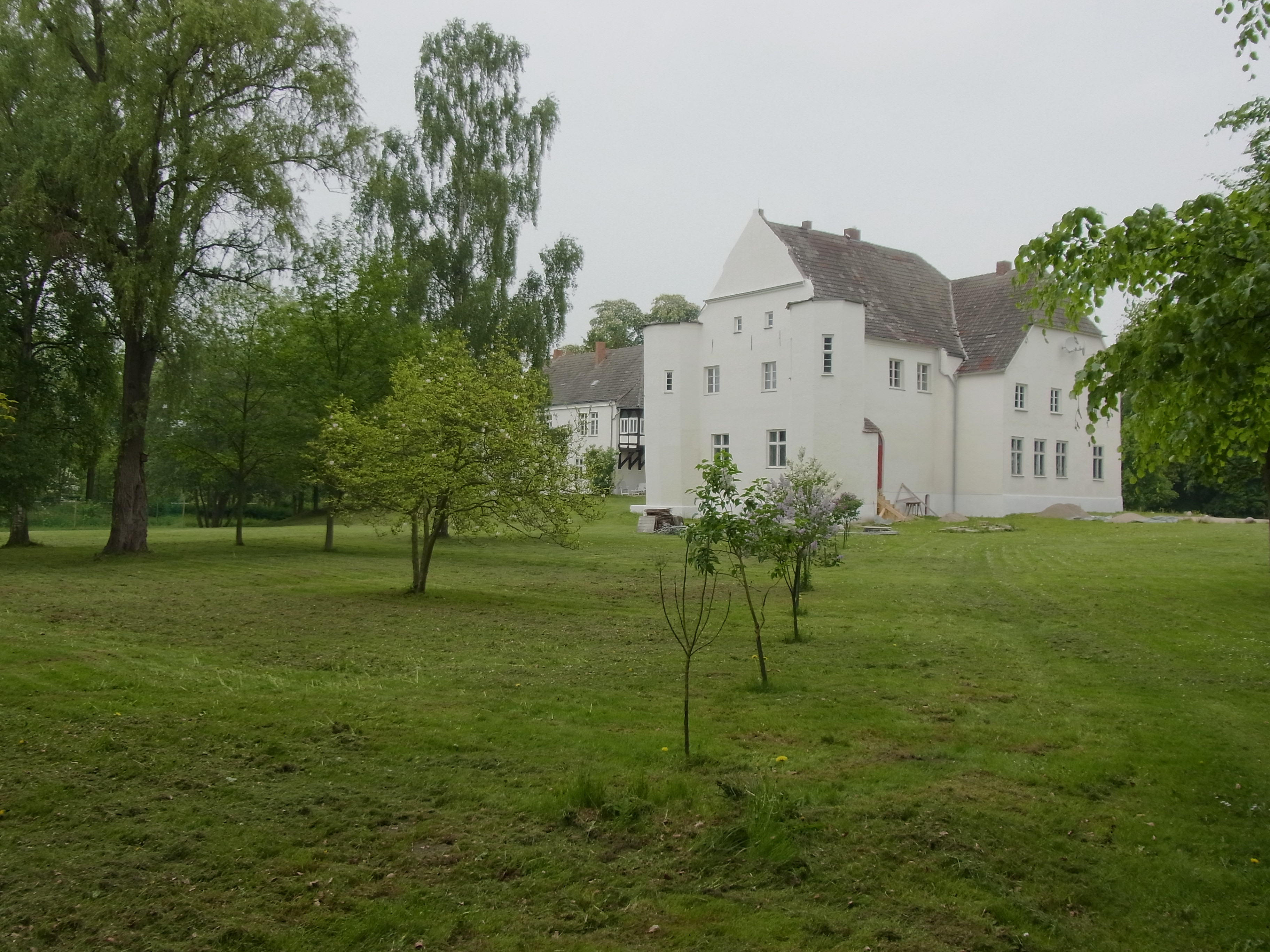 Schloss Klevenow Suedseite